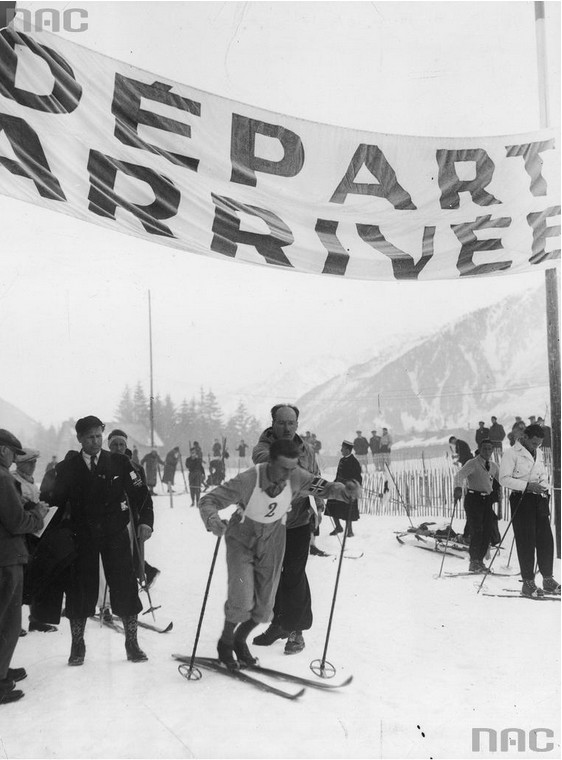 Lars Bergendahl à Chamonix en 1937 lors du départ du 18 km